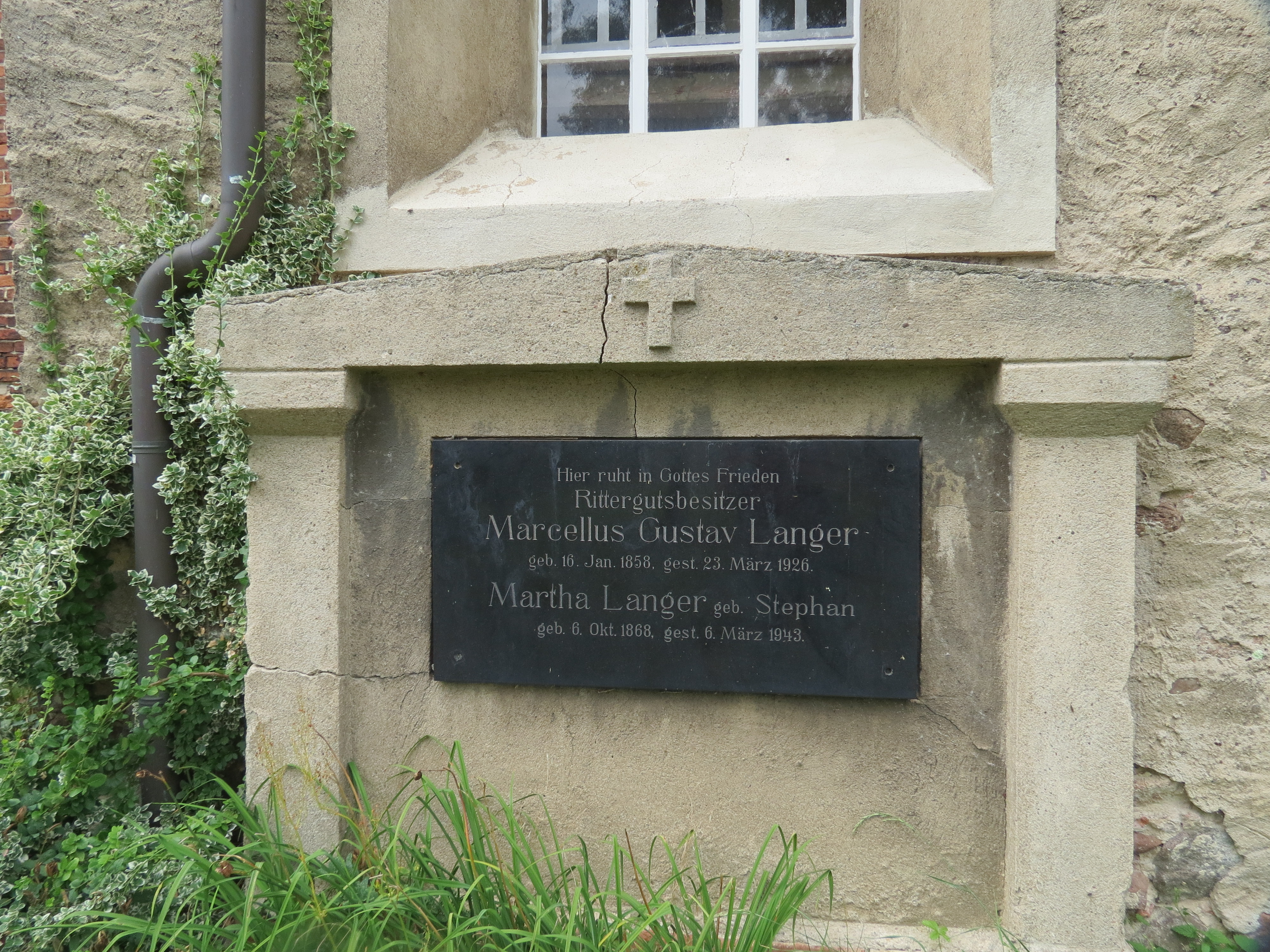 Grabmal des Marcellus Gustav Langer und seiner Frau Martha geb. Stephan an der Südseite der Dorfkirche Laubst, Ortsteil der Stadt Drebkau, Landkreis Spree-Neiße, Brandenburg